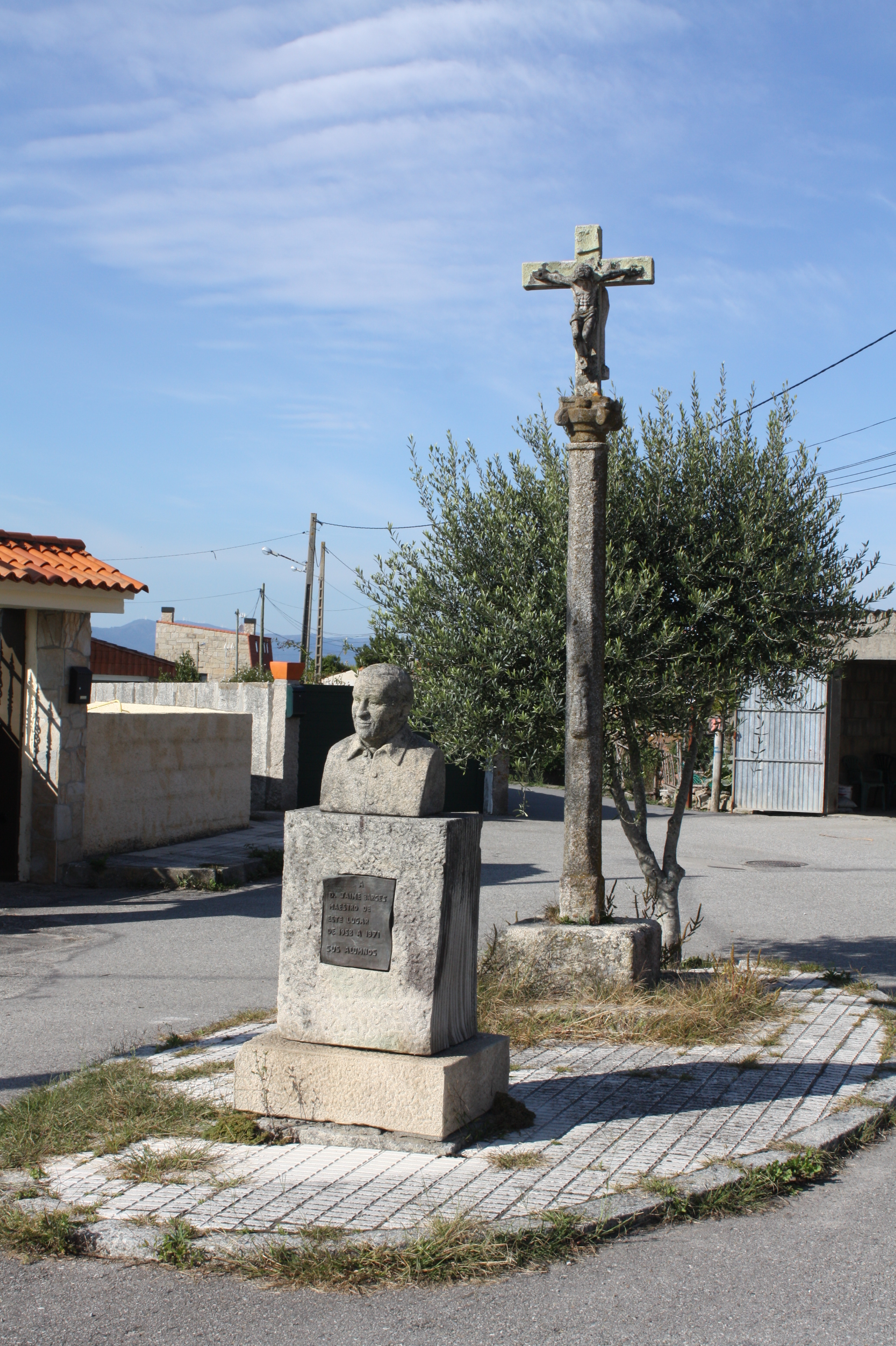 Praza da Gandariña, en Reboredo (O Grove), coa estatua dun antigo mestre da escola local, Jaime Barges